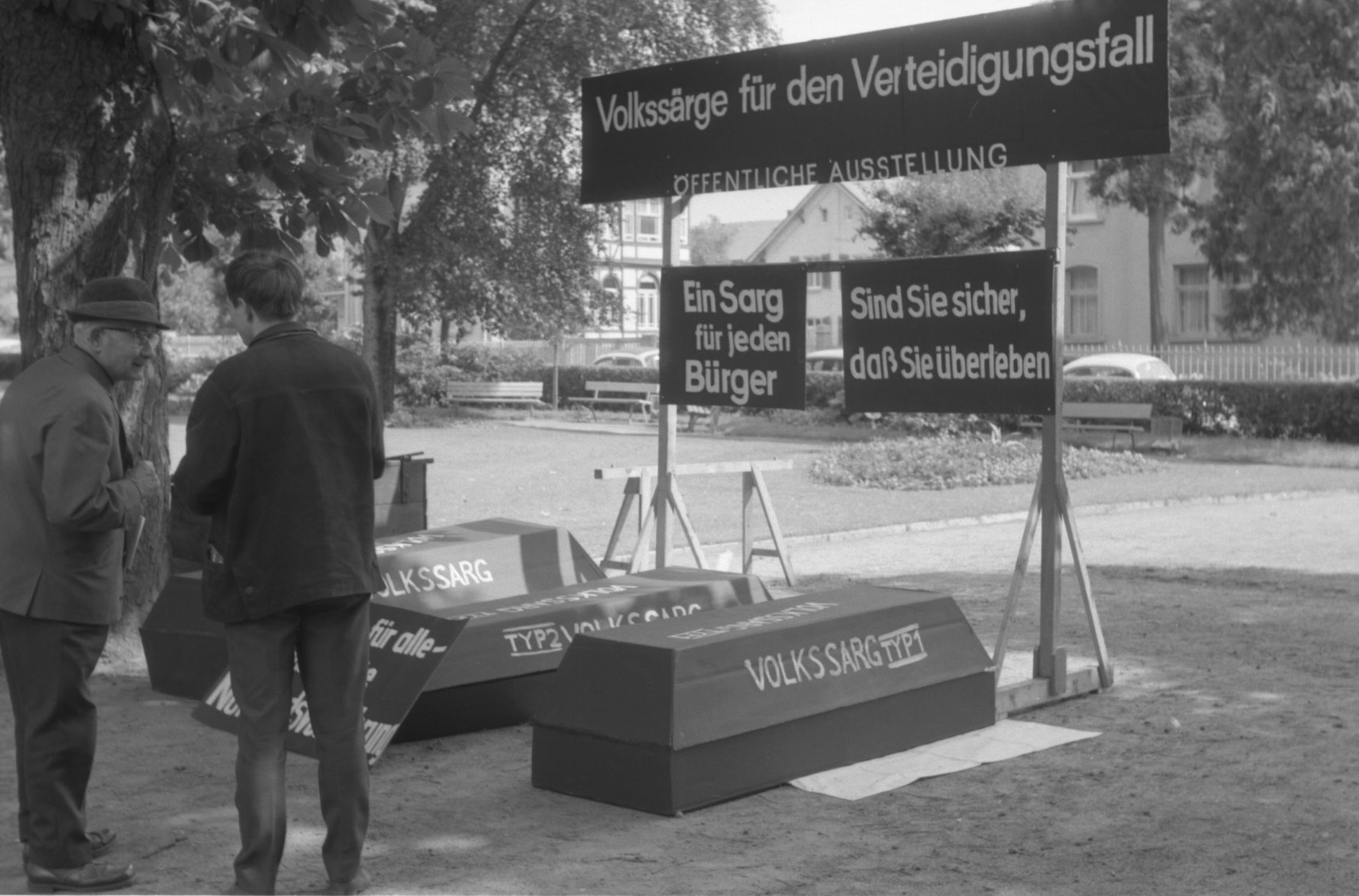 Protestaktion im Rahmen der Anti-Notstandskampagne zur Verhinderung der Notstandsgesetze. Die Aufnahme entstand 1965 in Oberursel.